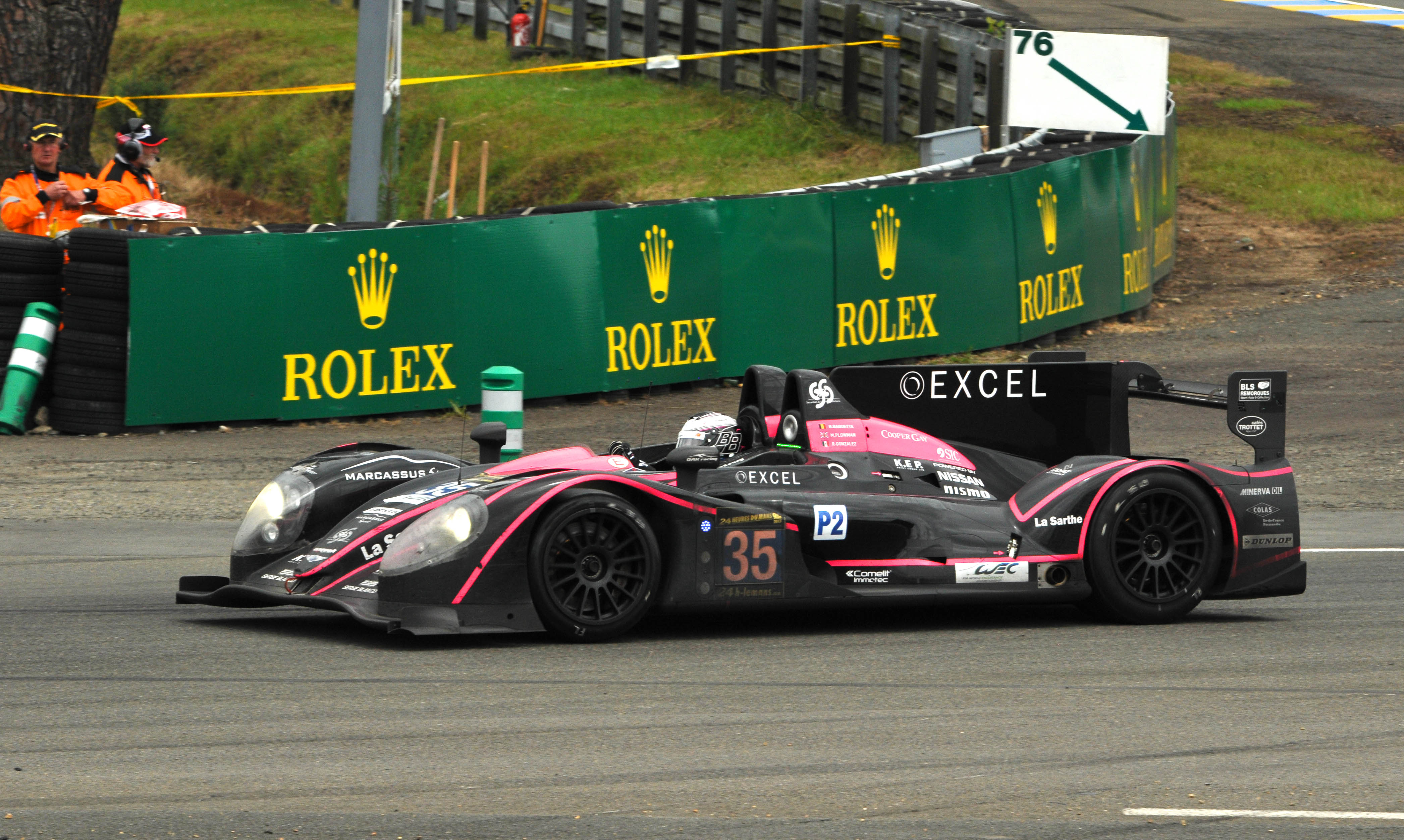 Le Mans 2013